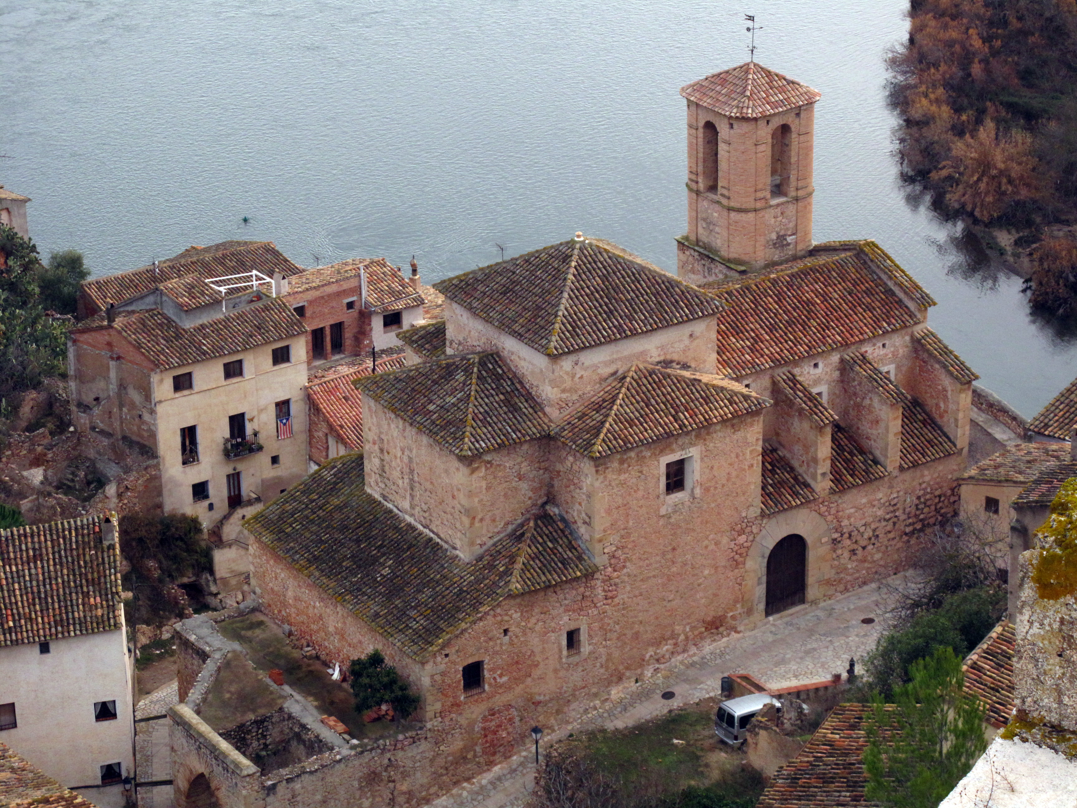 Església vella de Miravet